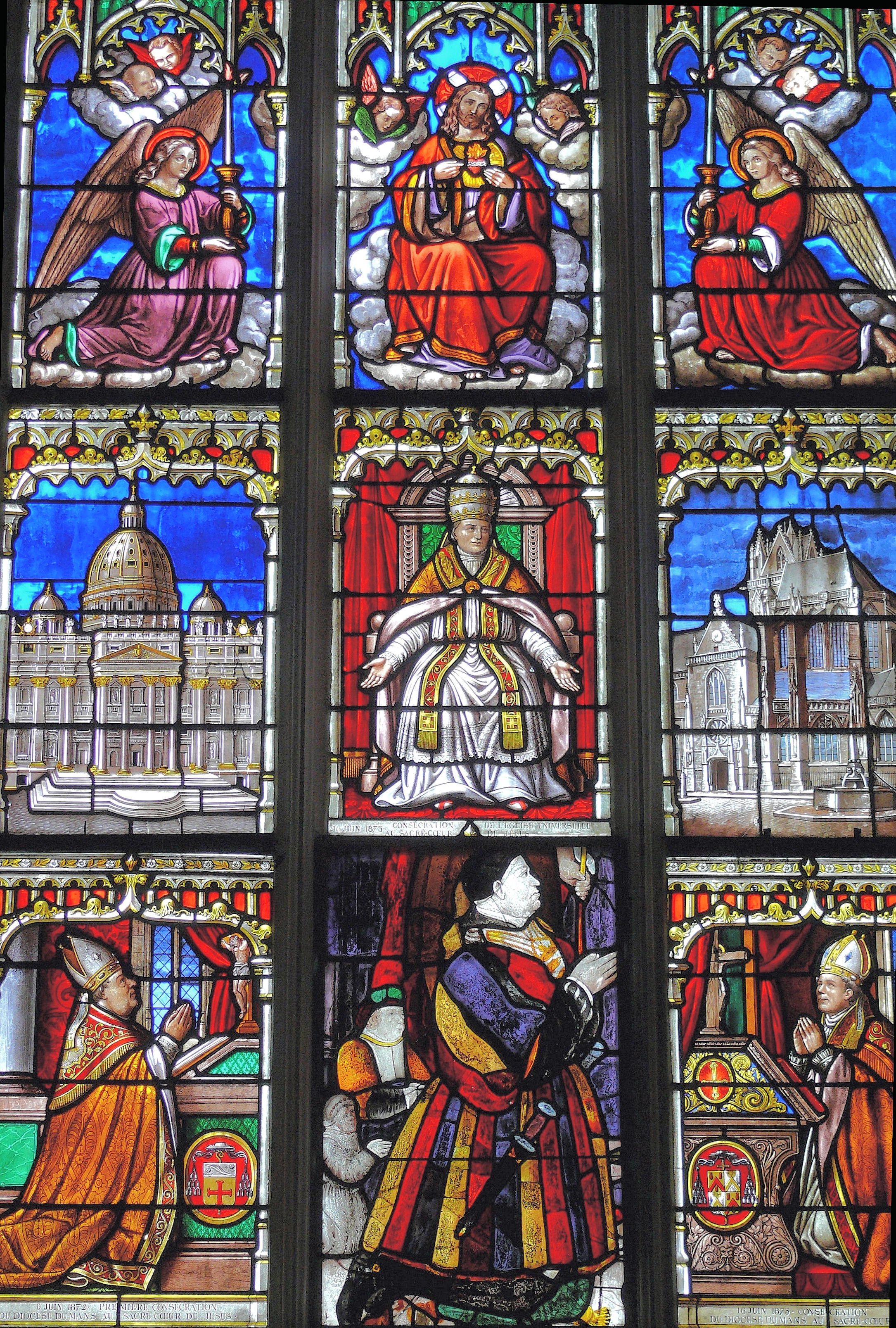 La Ferté-Bernard - Eglise Notre-Dame-des-Marais - Consécration de l'Eglise au sacré coeur de Jésus en 1875 - Donateur venant d'une verrière ancienne